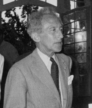 Cropped version of